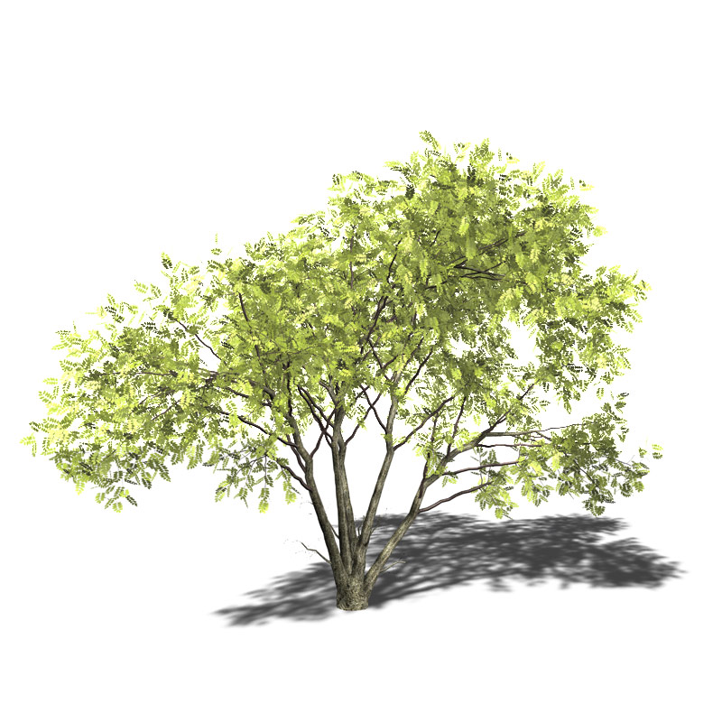 3D-Modell eines Acacia mellifera Baumes